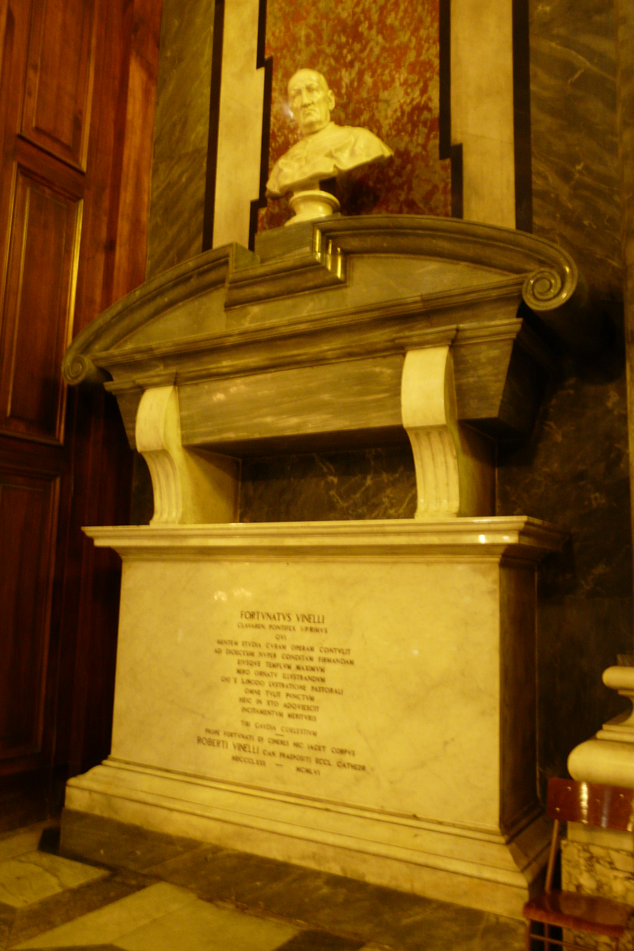 Tomba del vescovo Fortunato Vinelli all'interno della cattedrale di Nostra Signora dell'Orto di Chiavari, Liguria, Italia